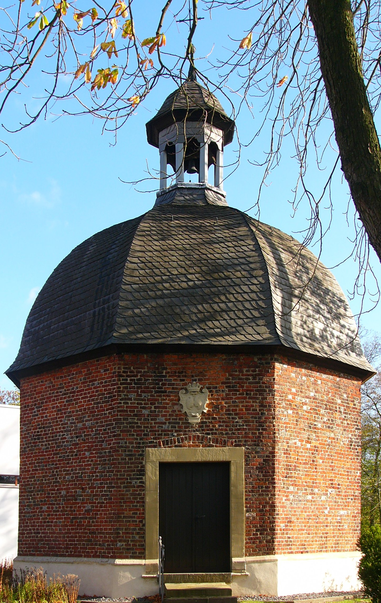 Kath. Kapelle St. Anna (Annenkapelle). This is a photograph of an architectural monument.